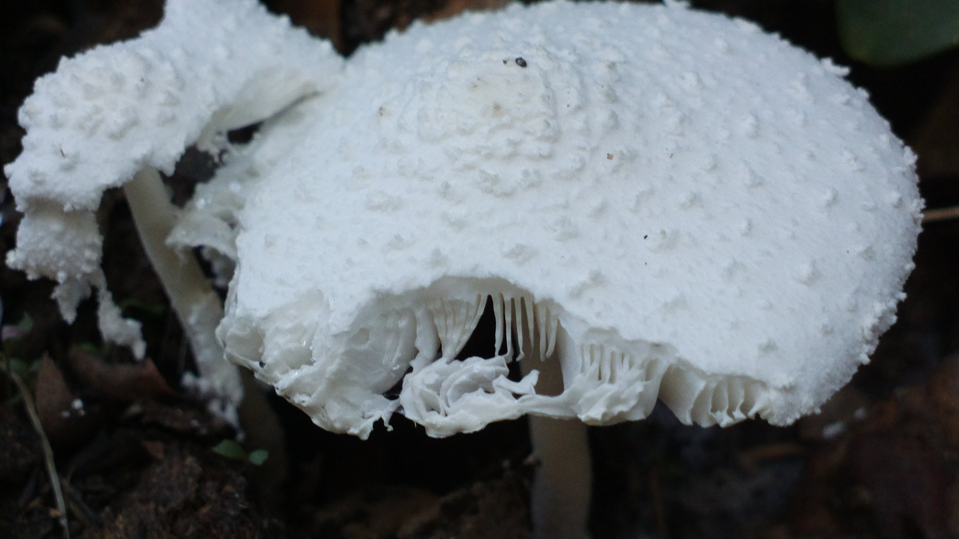 Leucocoprinus cretaceus (Bull.:Fr.) Locq.